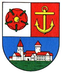 Stadtwappen von Riesa, Germany